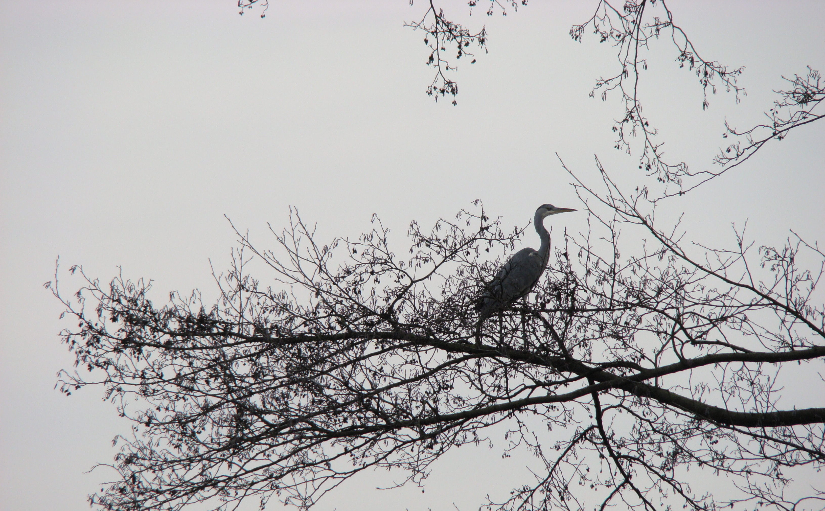 Graureiher in einer Erle Grey Heron in an alder tree at Meißendorf Lakes, Lower Saxony, Germany.